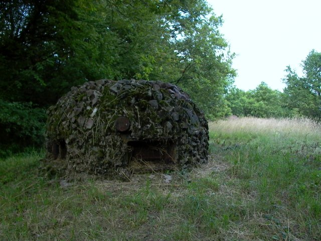 Zdjęcie przedstawia kopułę pancerną typu GFM w charakterystycznym maskowaniu na jednym z bloków grupy warownej "Hackenberg" Linii Maginota. Autor: Zbigniew Strucki